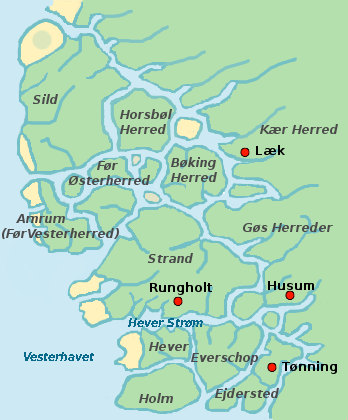 De nordfrisiske Udlande -med Rungholt- før stormfloden i 1362 (Den store manddrukning)